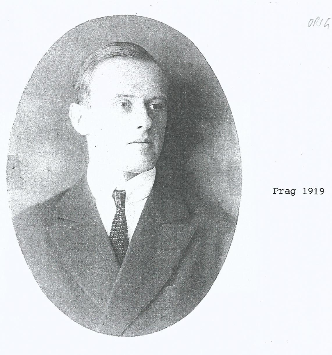 Porträtphoto des Architekten Rudolf Hildebrand (1886 - 1947).